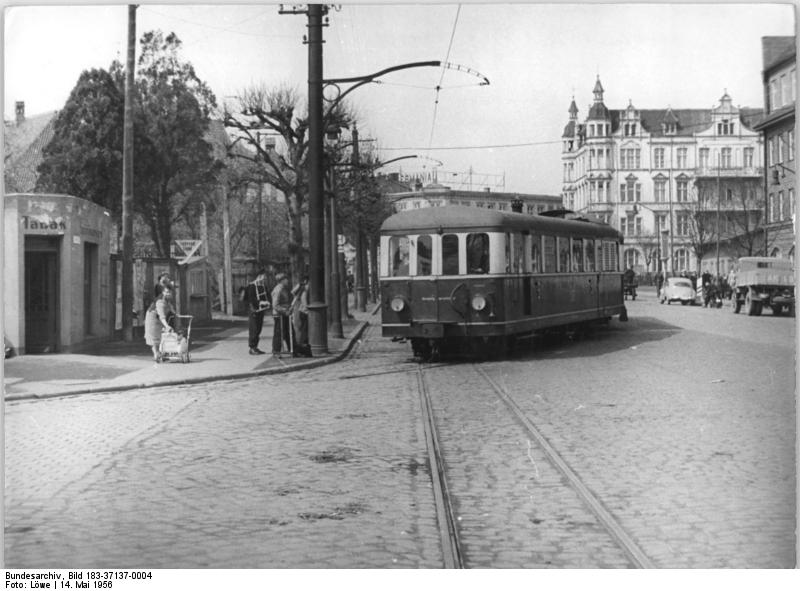 Stralsund, Hauptstraße, Straßenbahn Zentralbild Rostock 14.5.1956 Löwe Ein moderner Triebwagenzug der 1000 mm Spurweite, überquerte die Hauptstrasse in Stralsund.